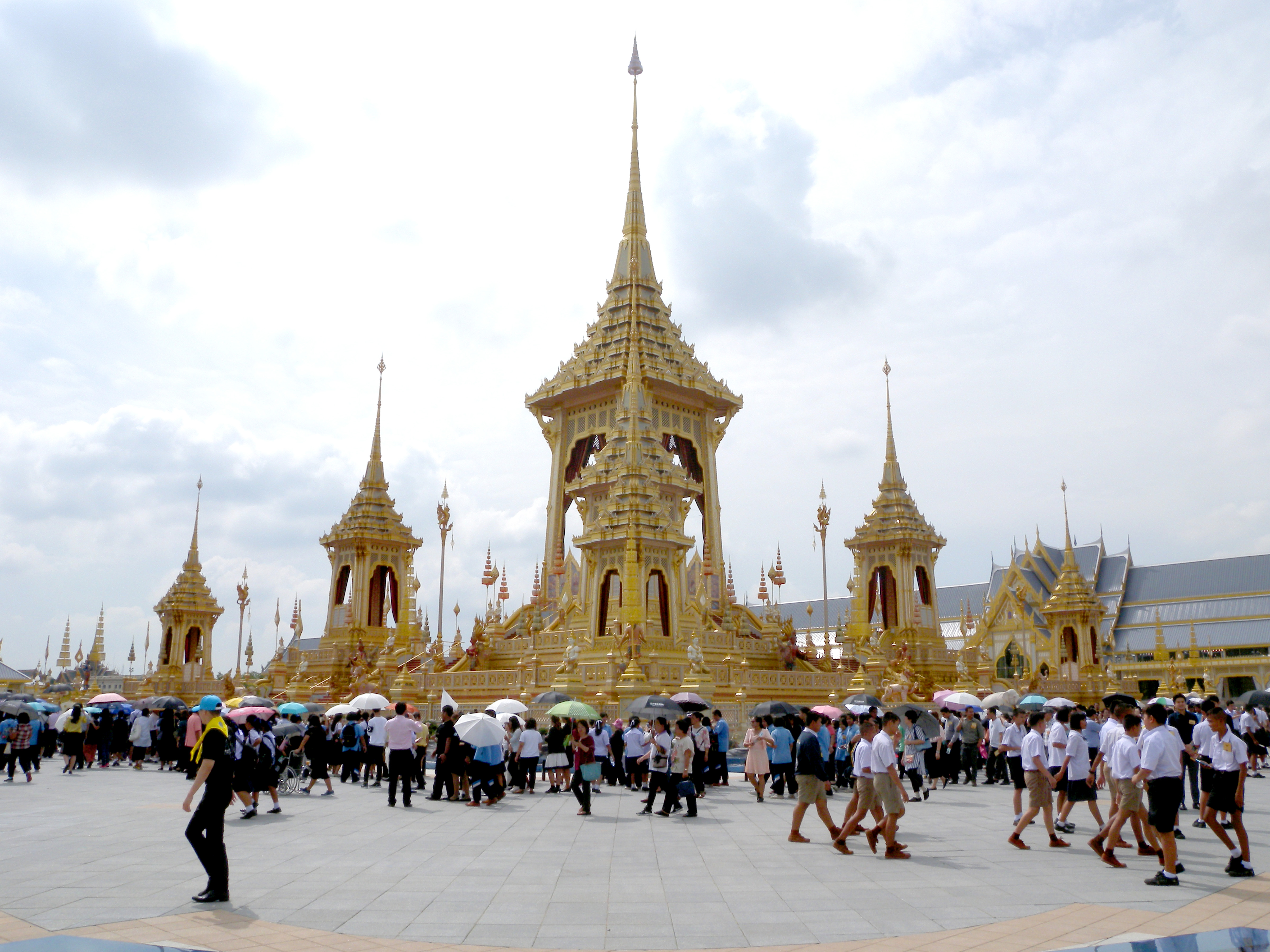 พระเมรุมาศสำหรับพระราชพิธีถวายพระเพลิงพระบรมศพ พระบาทสมเด็จพระปรมินทรมหาภูมิพลอดุลยเดช สยามินทราธิราช บรมนาถบพิตร ณ ท้องสนามหลวง กรุงเทพฯ บันทึกภาพเมื่อวันที่ 21 พฤศจิกายน พ.ศ. 2560